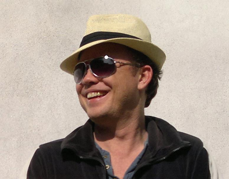 Drummer van De Kast / Spanner